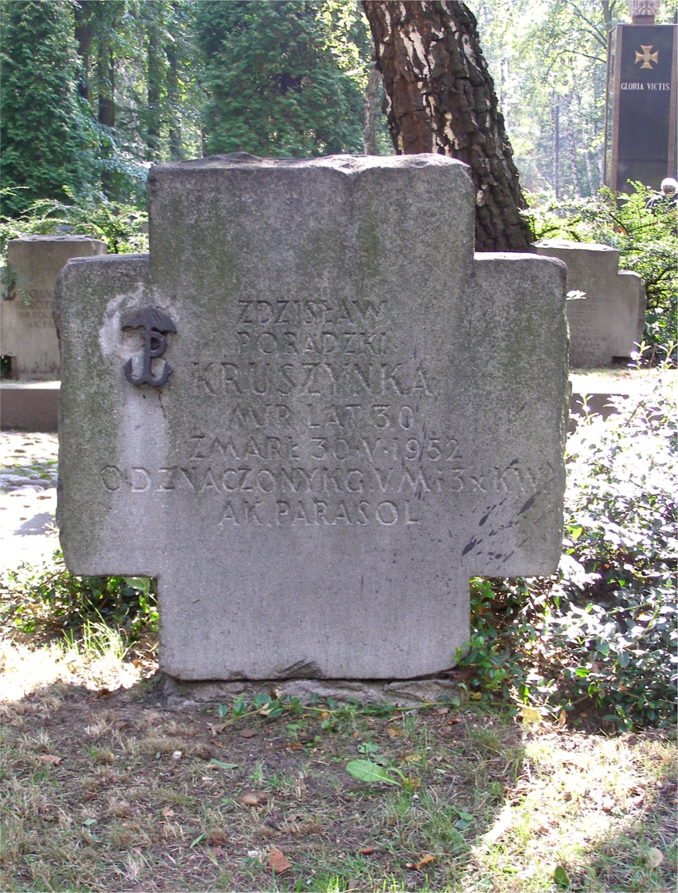 grób Zdzisława Poradzkiego na Powązkach Wojskowych w Warszawie (fot Zu)